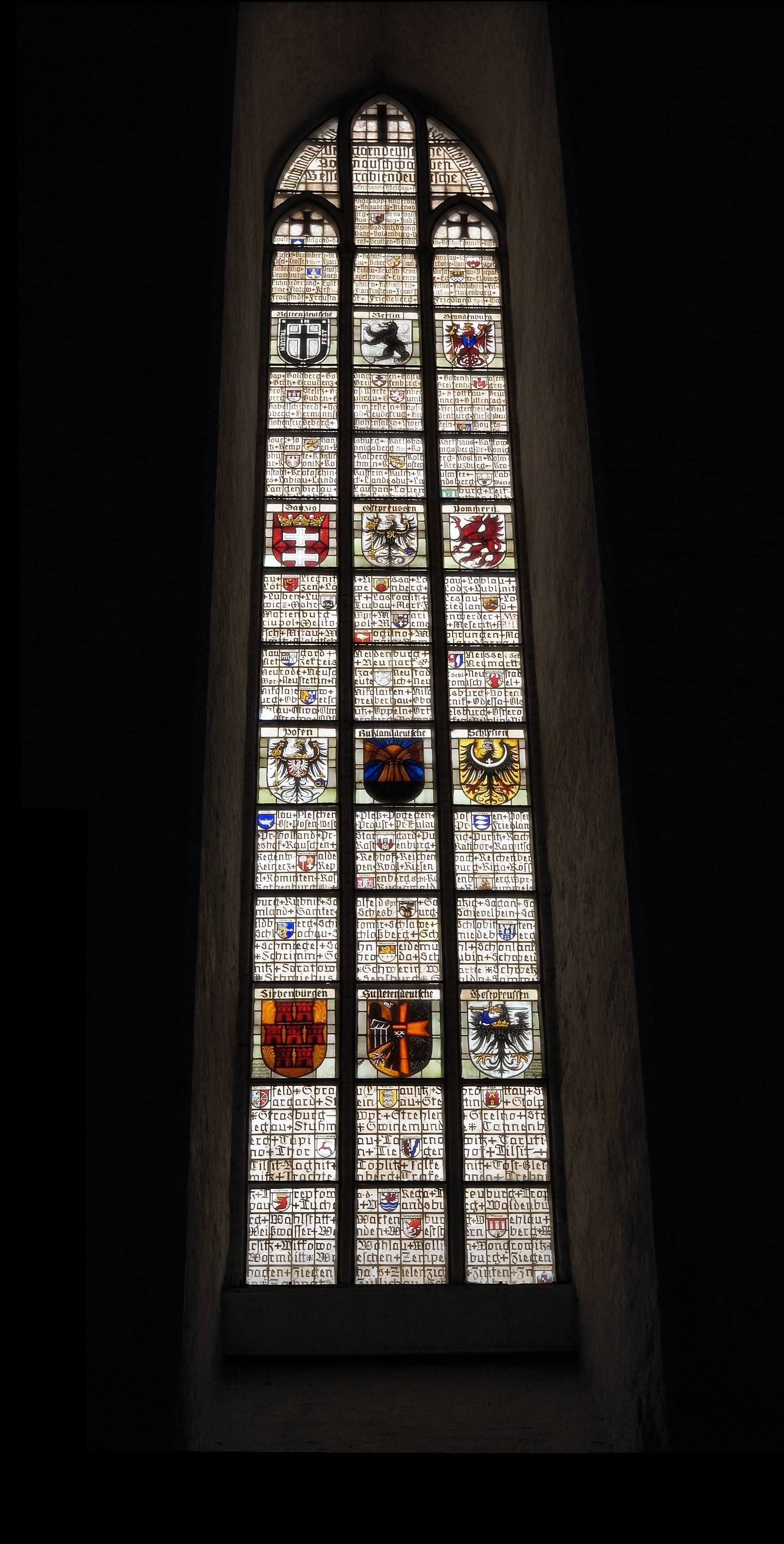 Fenster im Südturm von St. Marien in Lübeck, an die Deutsche Besiedlung in Osteuropa erinnernd